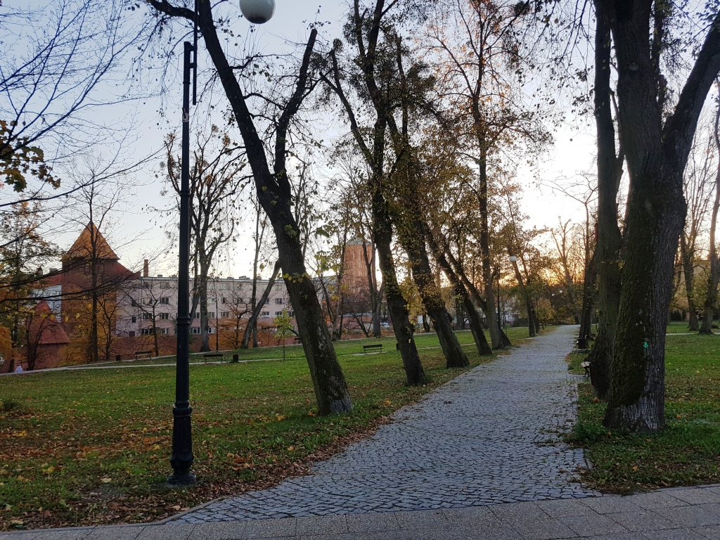 Cmentarz św. Jana w Braniewie, alejka, 2018